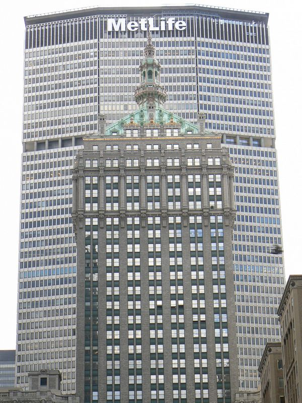 Le Helmsley Building et le Metlife Auteur : Olivier Perrin